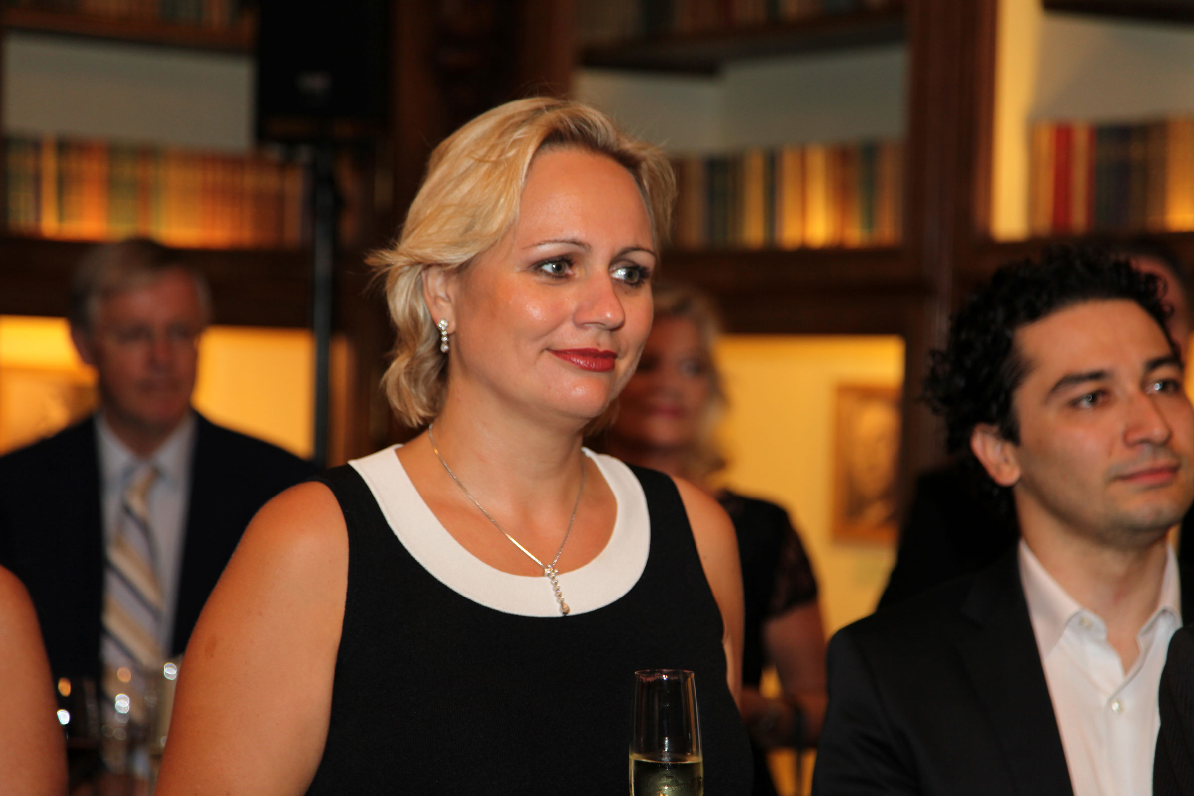 Kampe_Anja-5406, 19.08.2010: Musik-Festival Grafenegg